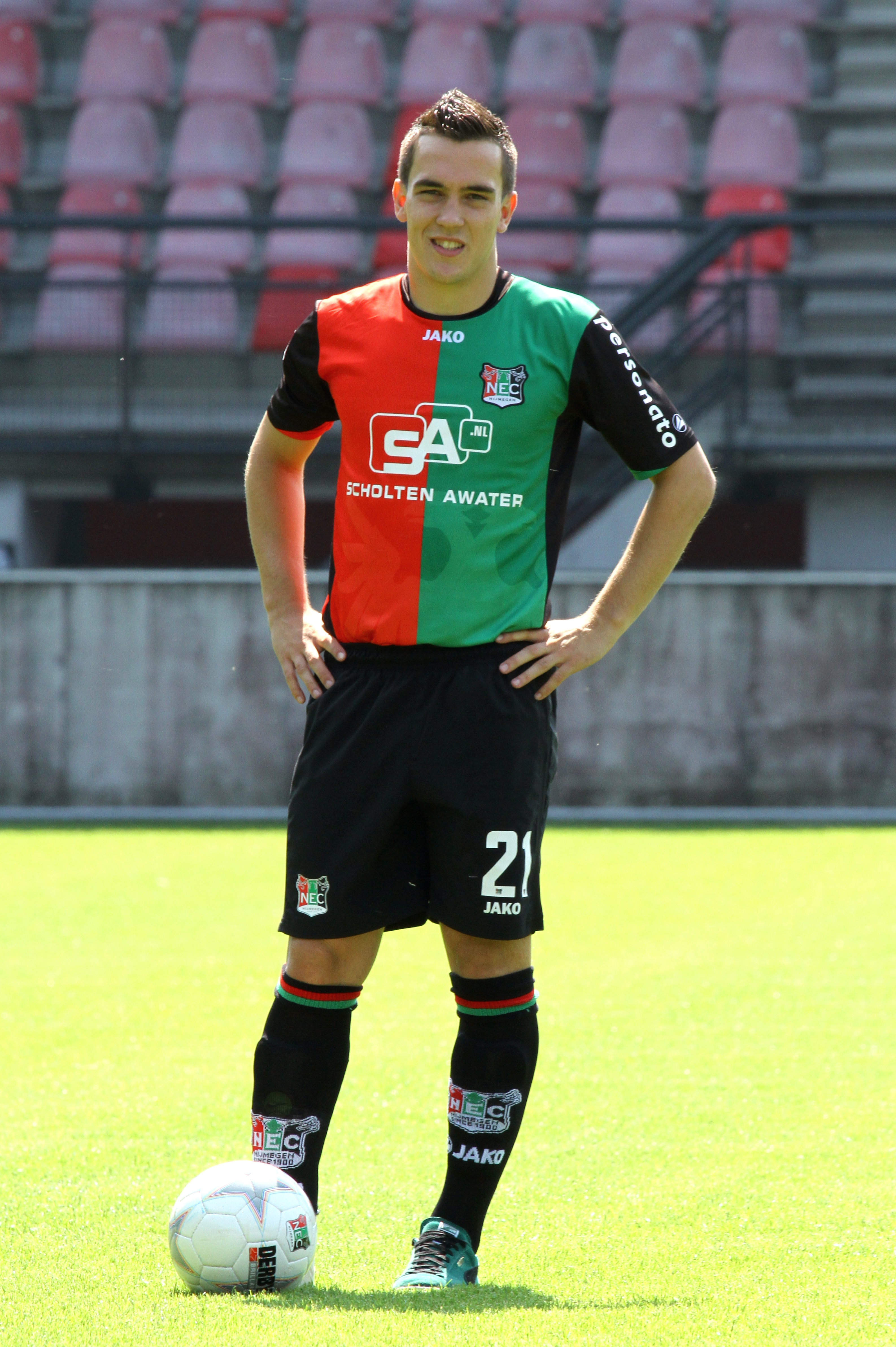 Spelerspresentatie NEC seizoen 2013-1014 Daan Disveld